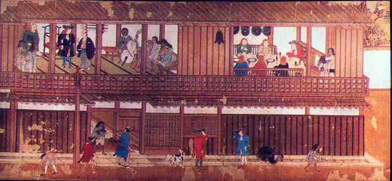 Loge van Deshimaopperhoofds woning op